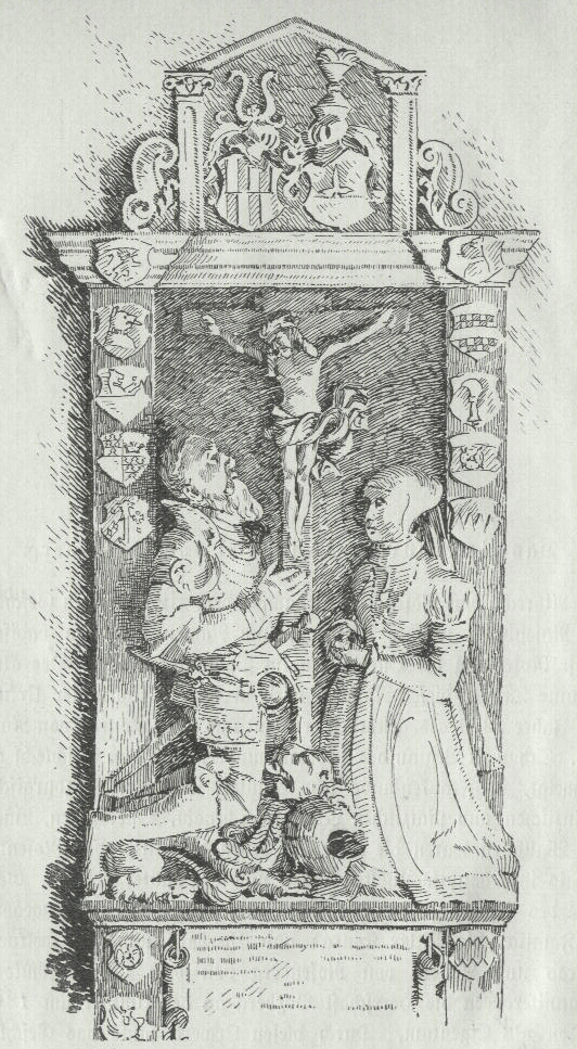 Zeichnung des Epitaphs des Ritters Albrecht von Rosenberg in Unterschüpf